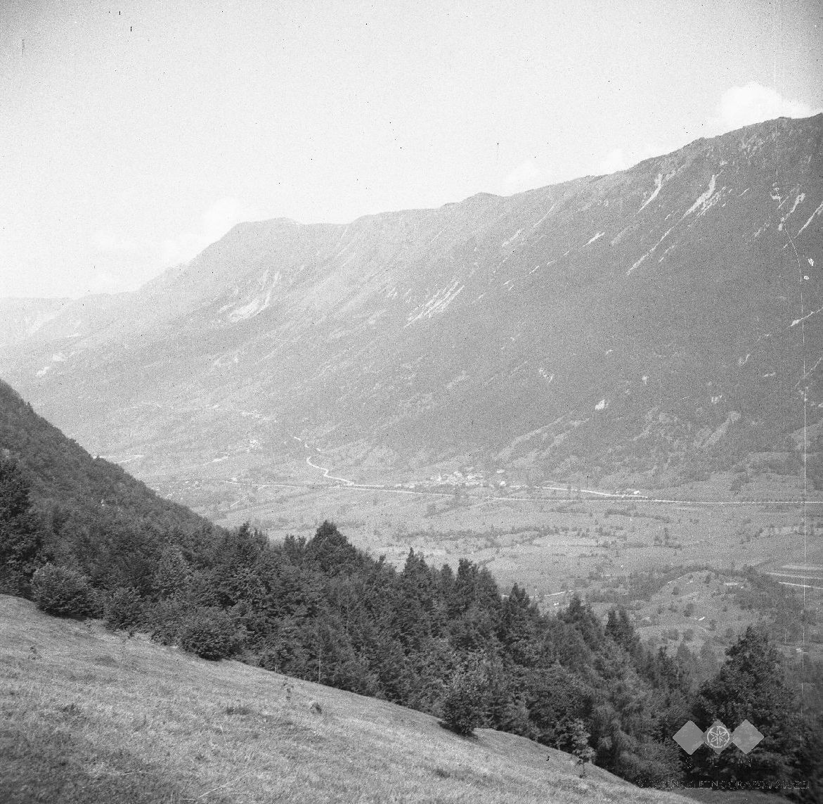 Pogled na vas Staro selo, Kred, Potoke in Borjano s Črče (senožeta nad Sužidom).